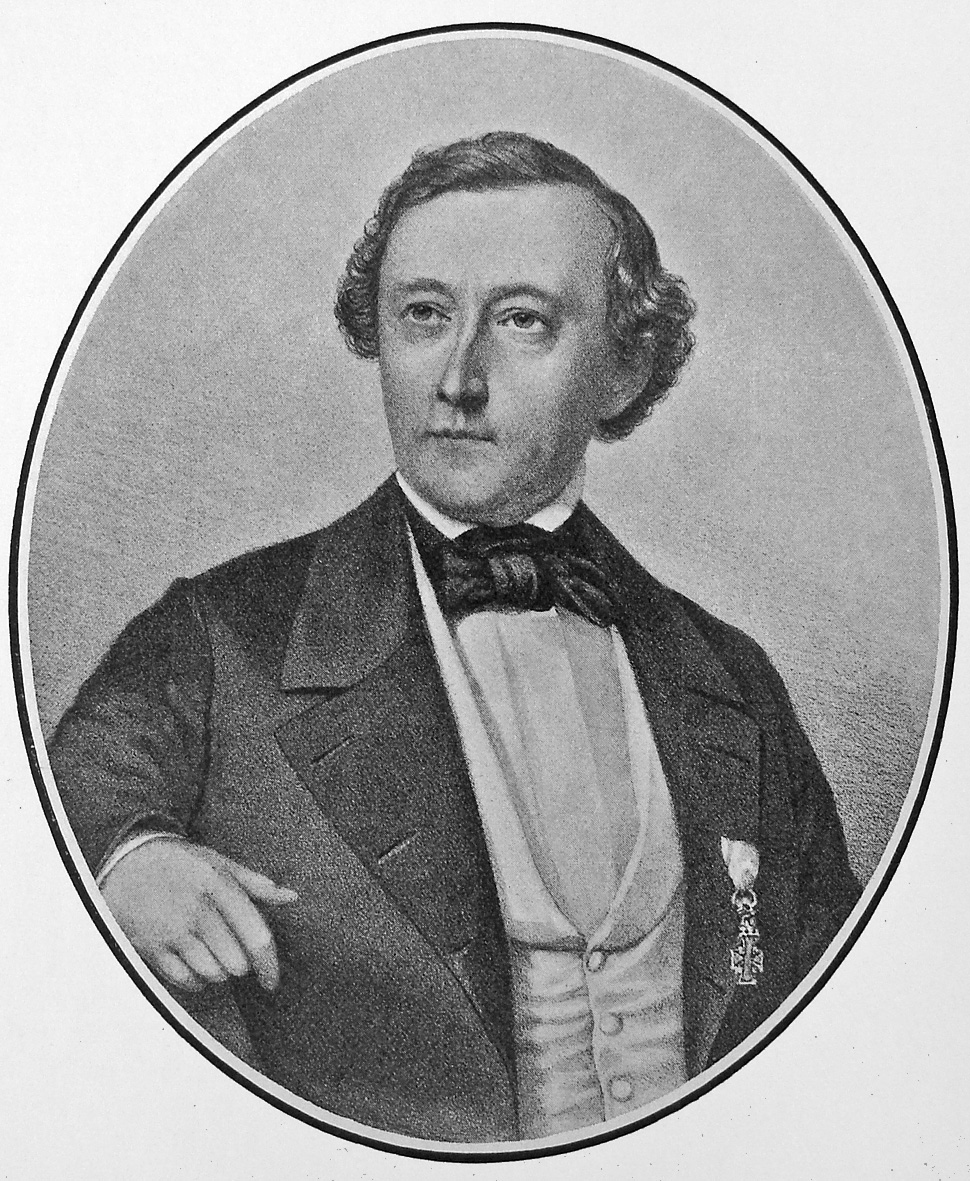 August Bournonville (21. august 1805 i København - 30. november 1879 i København) var en dansk balletdanser, koreograf og balletmester.